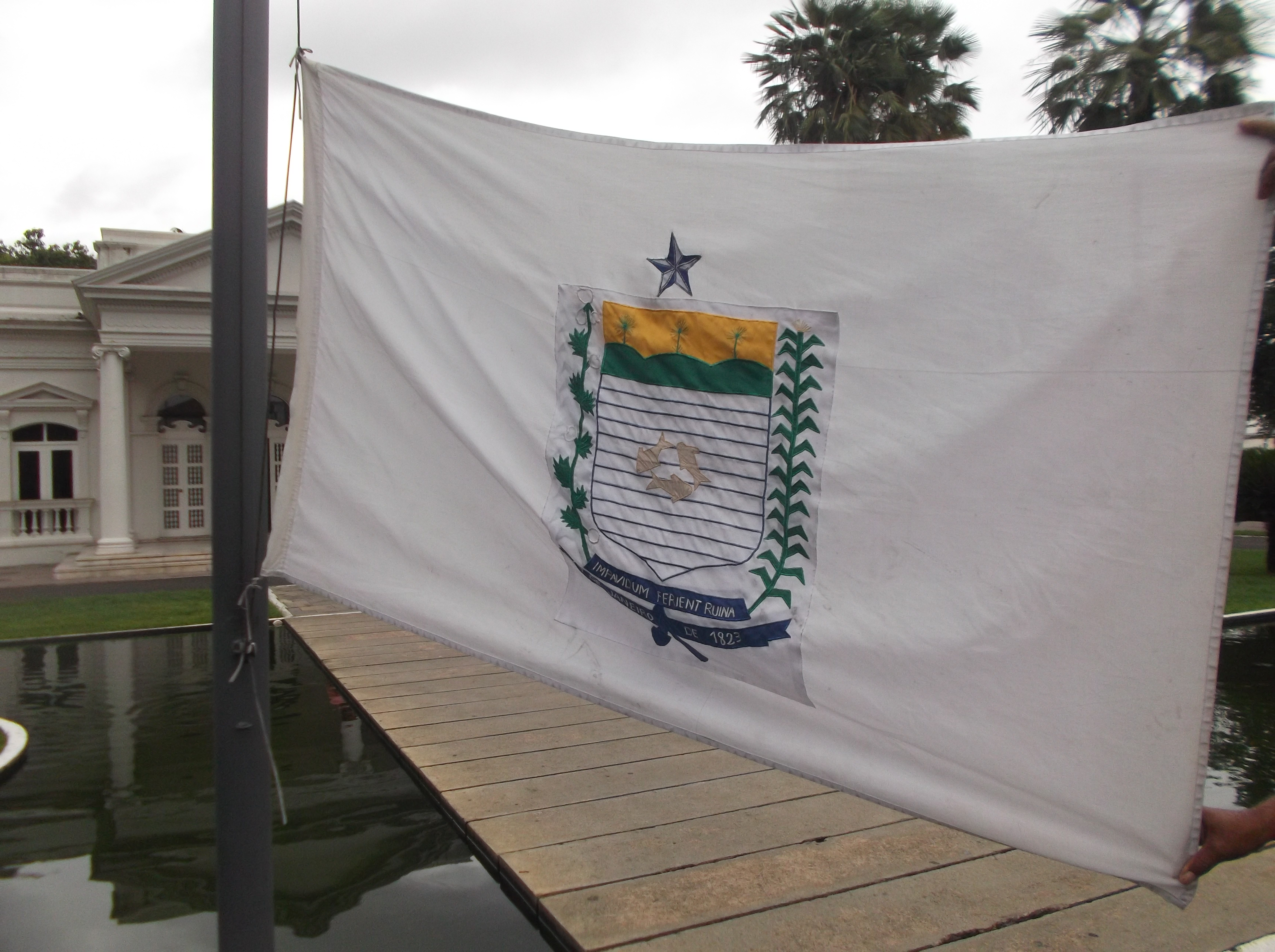 Bandeira do(a) governador(a) do Piauí em frente ao palácio de Karnak.